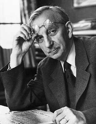 Zeth ("Zäta") Höglund, stridbar socialist, här fotograferad 1953.